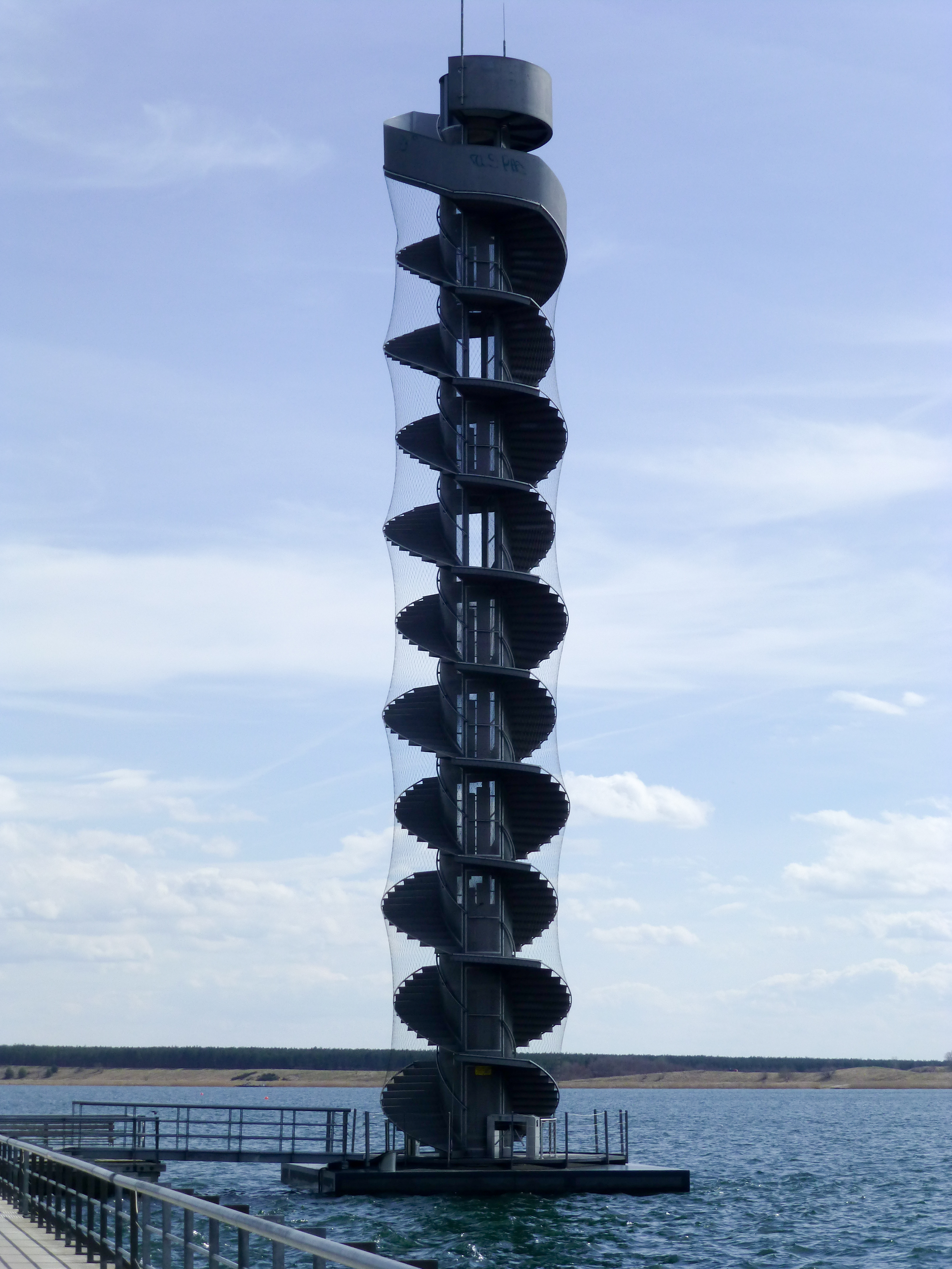 Pegelturm mit doppelter Wendeltreppe; Ansicht von der Seebrücke